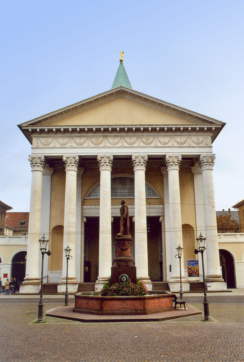 Karlsruhe, Deutschland. Portikus der evangelischen Stadtkirche. Das Gotteshaus am Marktplatz wurde von Friedrich Weinbrenner 1802-1816 entworfen und ausgeführt.